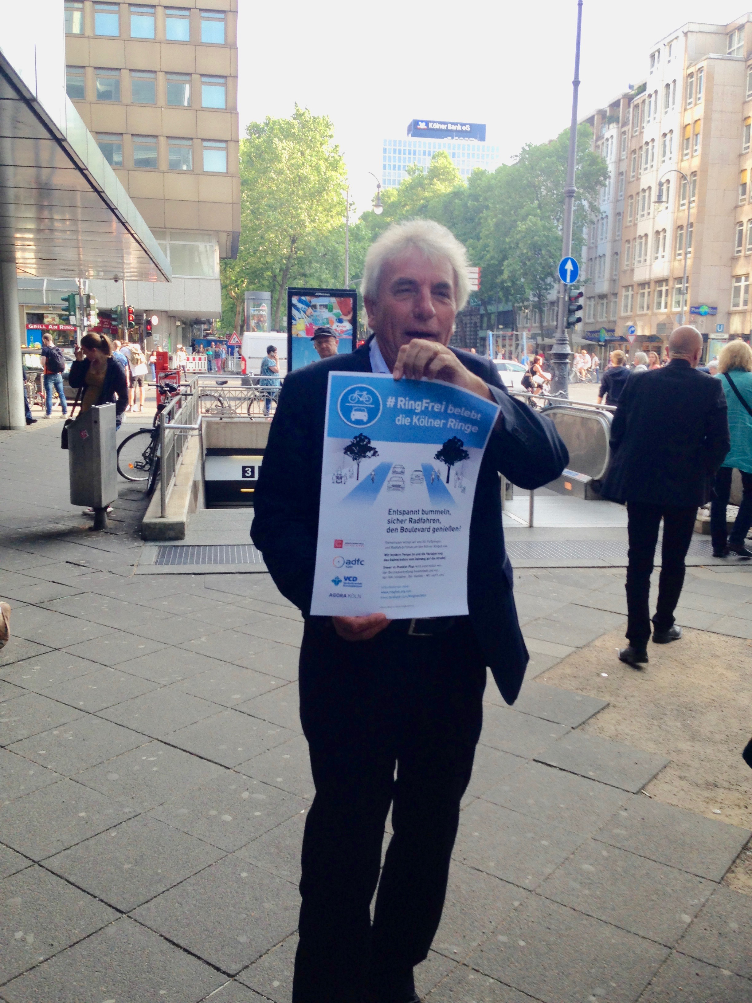 Altoberbürgermeister Jürgen Roters präsentiert am 9. Juni 2016 das aktuelle Plakat aus der dritten #RingFrei-Serie, hier am Friesenplatz an den Kölner Ringen.